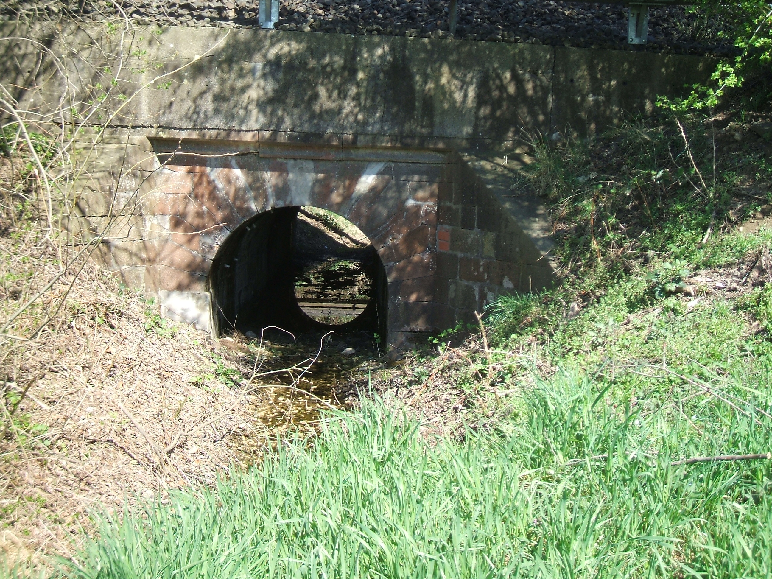 Einlass der Bahnunterführung des Säckelgrabens unter der Main-Weser-Bahn in Ober-Mörlen